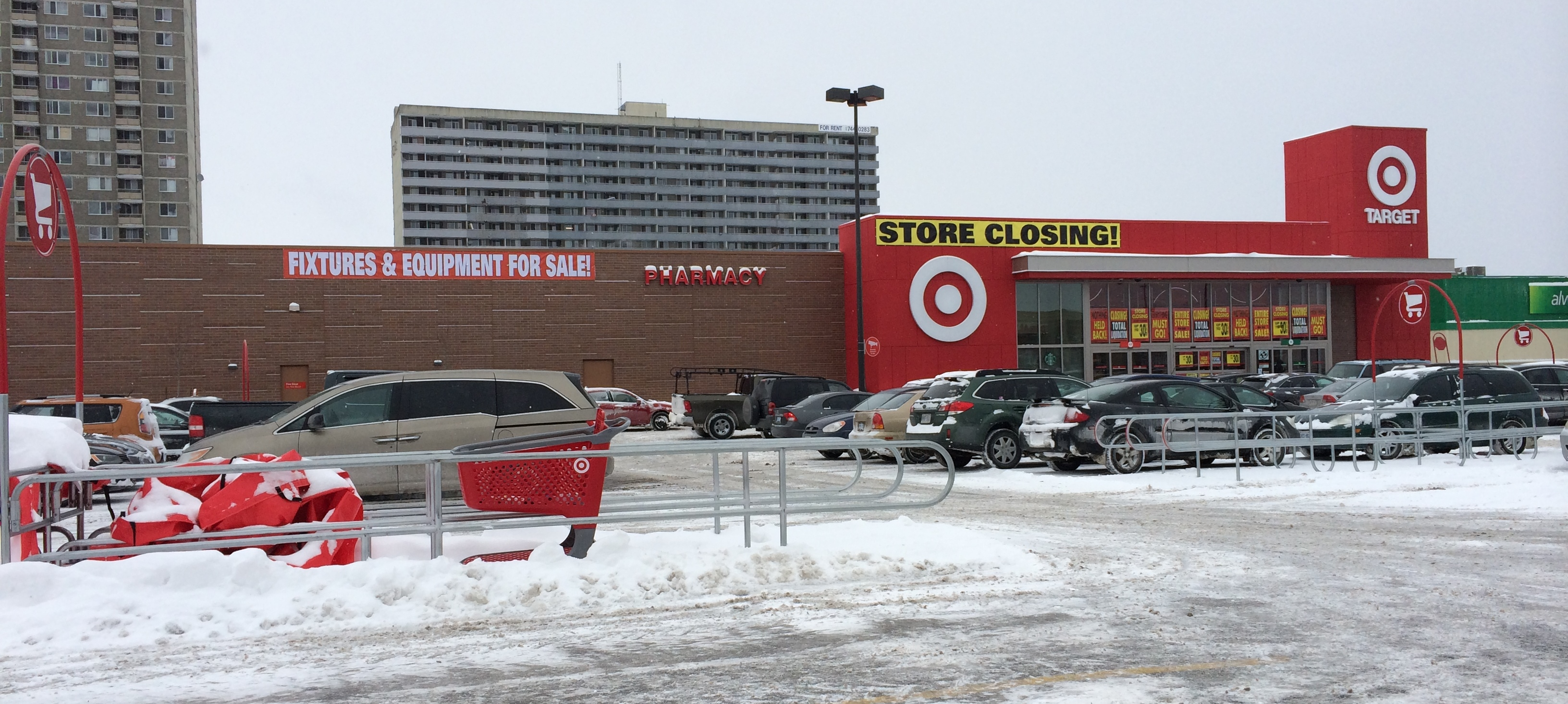 Target St Laurent Blvd Ottawa ON 1